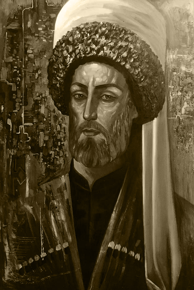 Шейх Мансур, Ушурма (1765 — 13 апреля 1794) — военный, религиозный и политический лидер кавказских горцев в конце XVIII века. Один из видных деятелей Кавказской войны 1785—1791 годов.